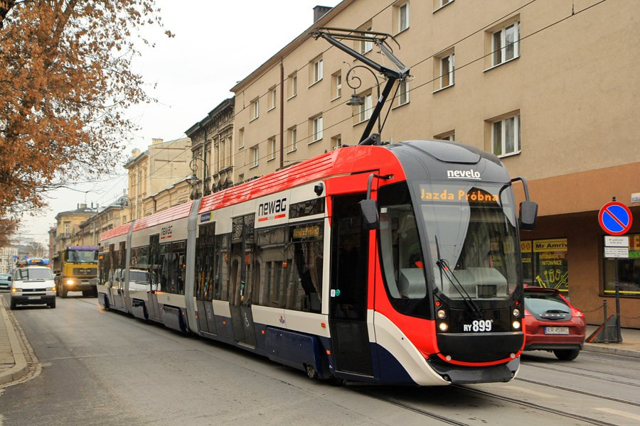 Tramwaj Newag Nevelo podczas pierwszego dnia jazd próbnych po powrocie do Krakowa w 2016.